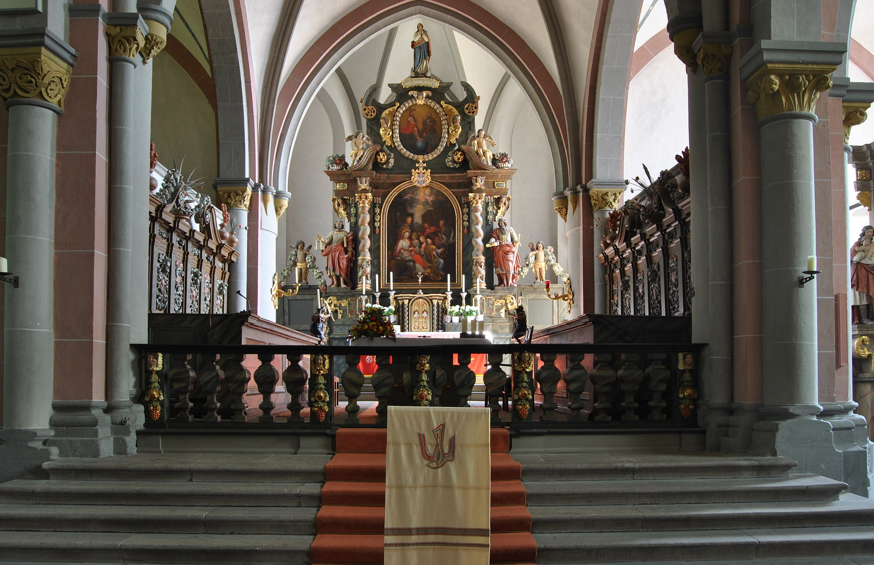 Marsberg (Nordrhein-Westfalen) – Obermarsberg – Stiftskirche St. Petrus und Paulus – Innenansicht This image shows a heritage building in Germany, located in the North Rhine-Westphalian city Marsberg (no. 15). This photograph was taken with a Nikon D3000